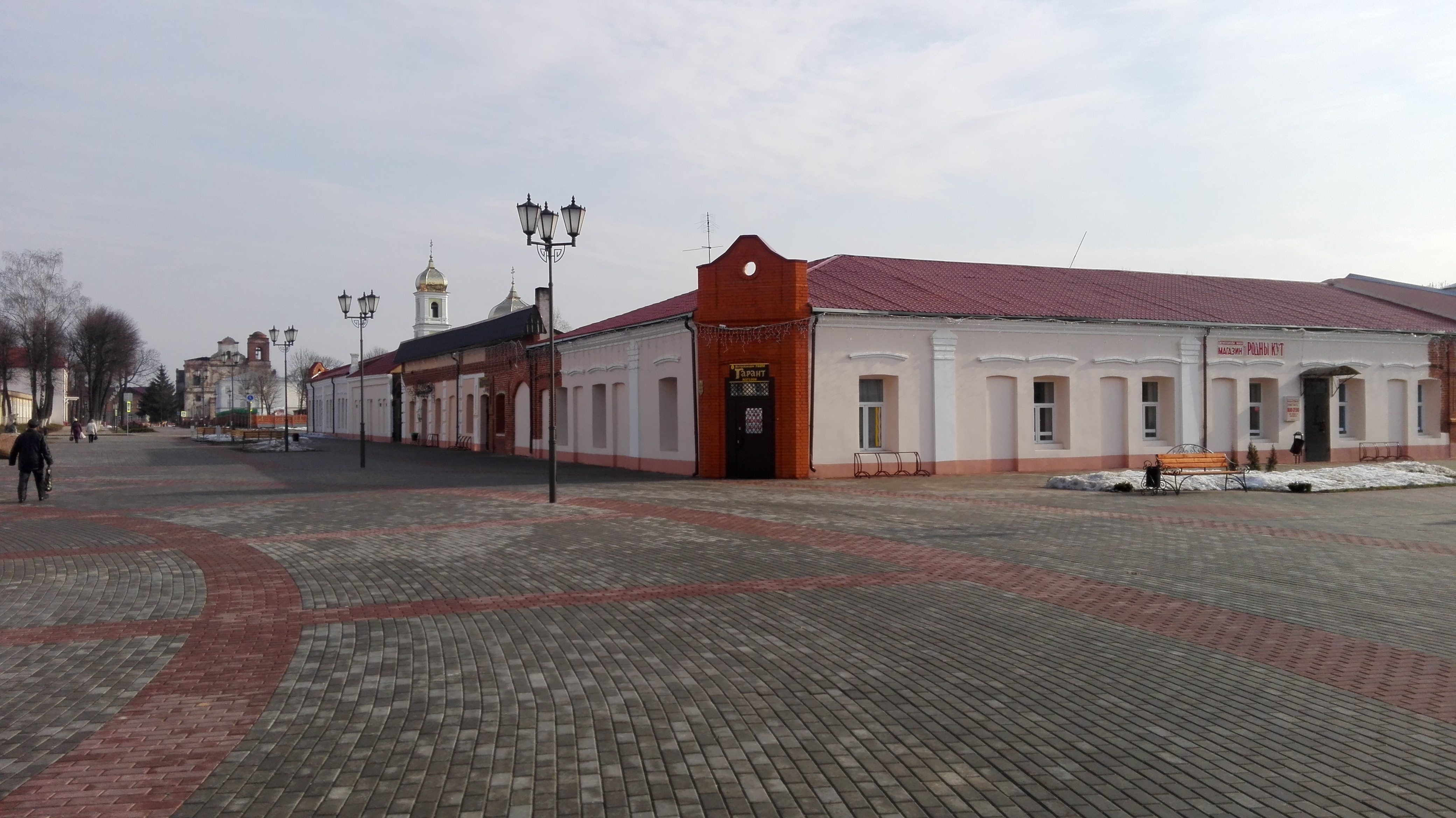 г. Мстиславль, ул. Пираговская